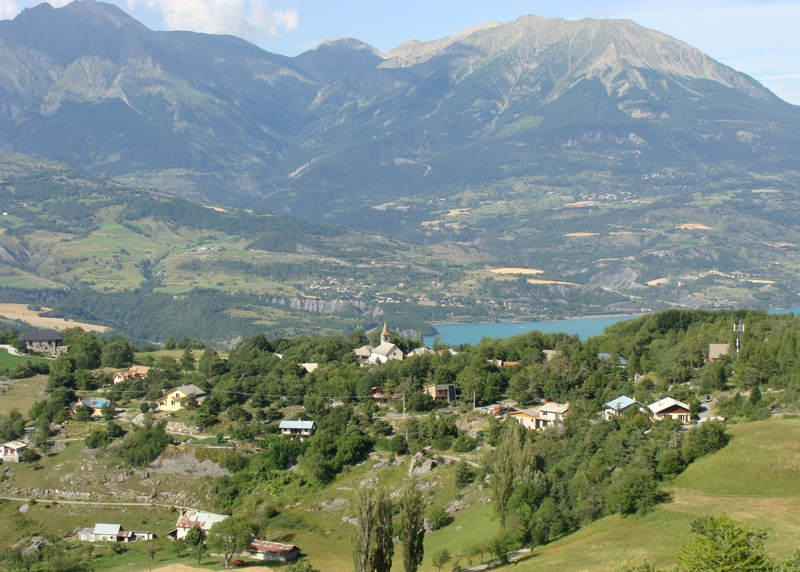 Pontis vu depuis la route du col.